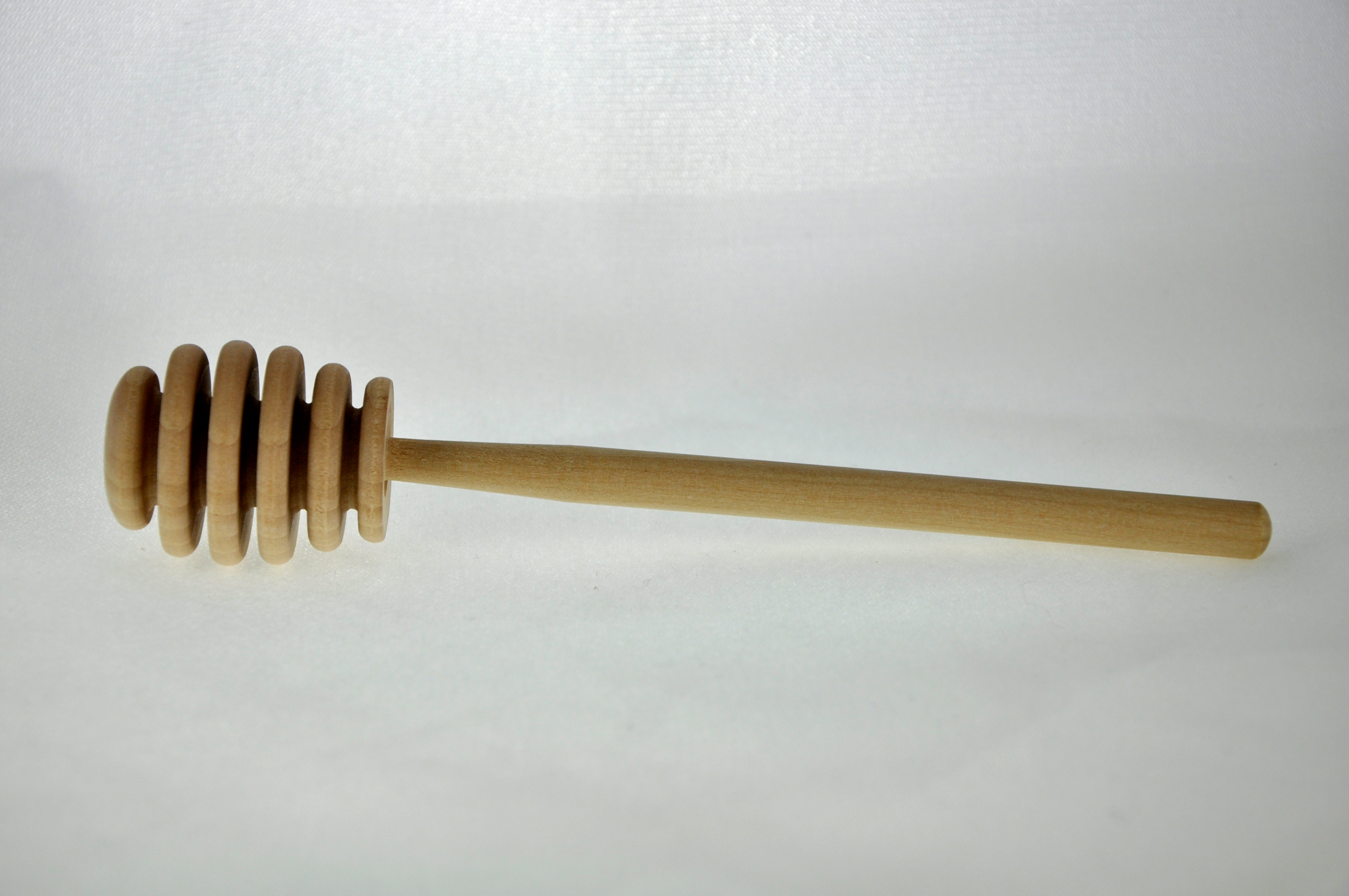 Wooden honey dipper